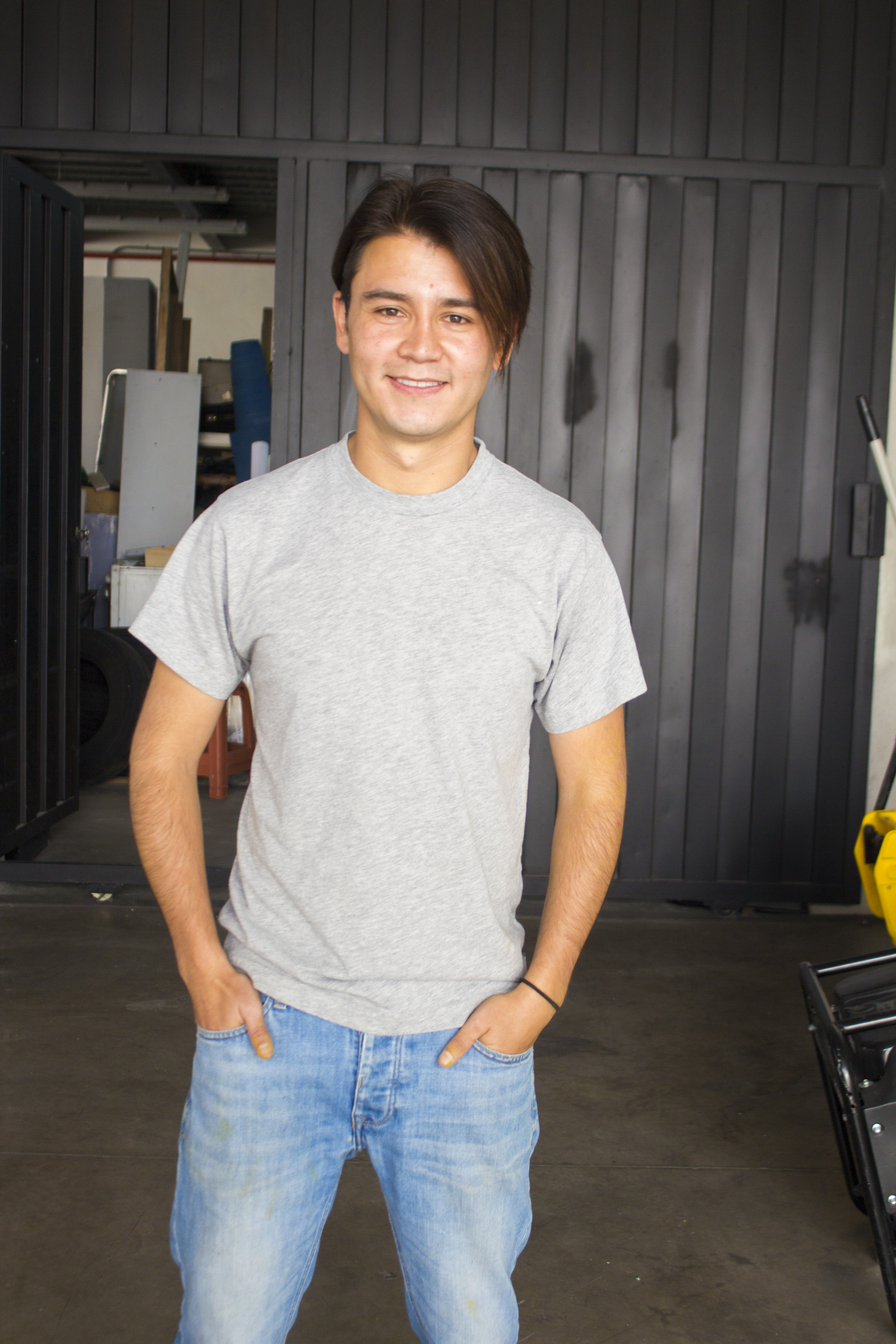 Raúl Santana, actor y maquillador de Enchufe.tv, de TouchéFilms, conocido por su personaje de Chichico.